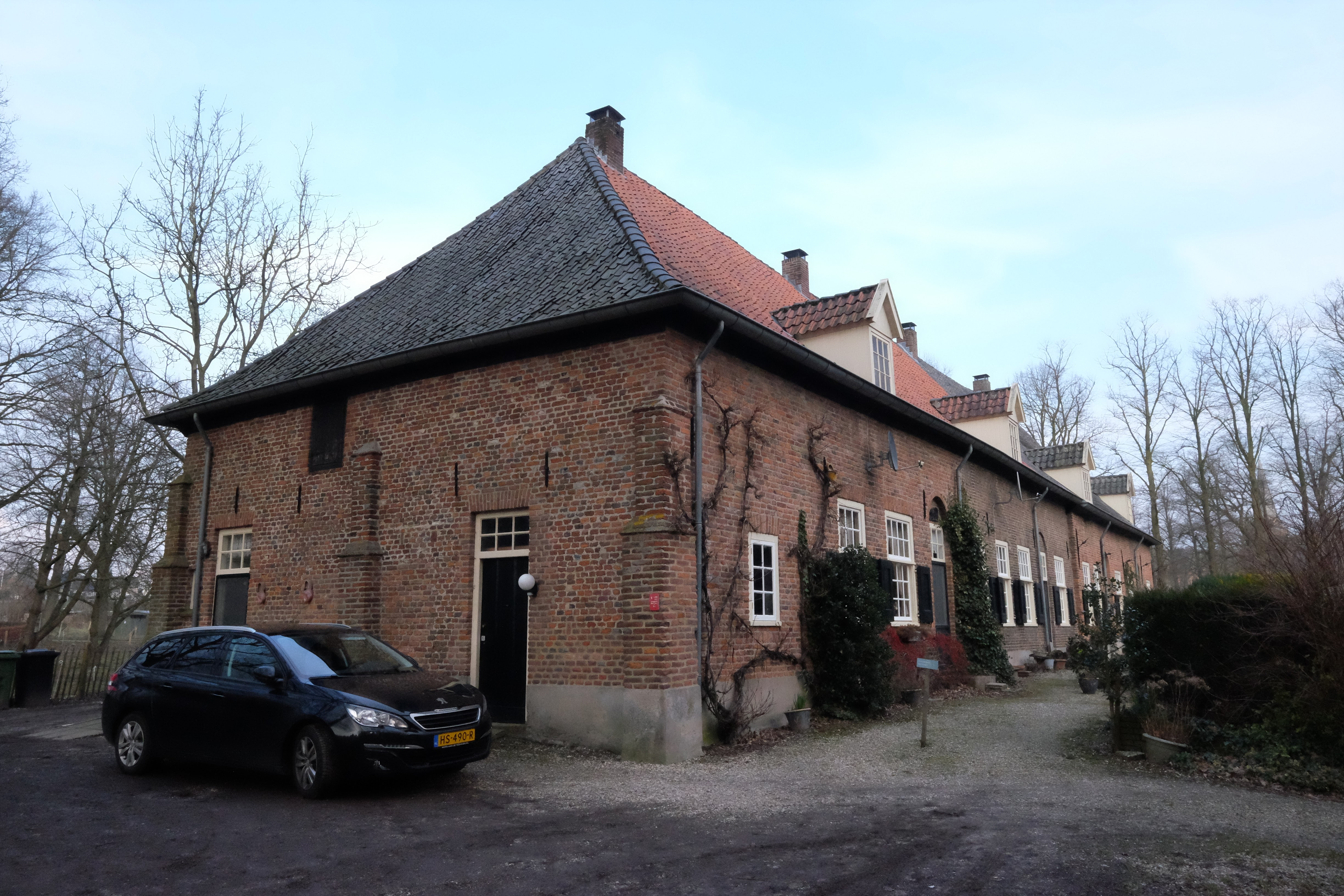 7041 's-Heerenberg, Netherlands